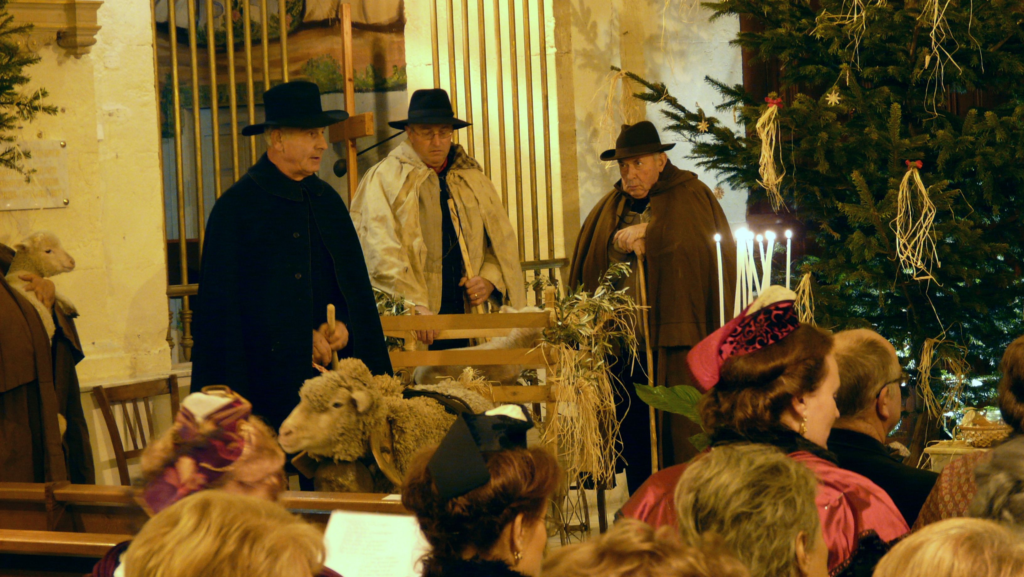 Pastrage